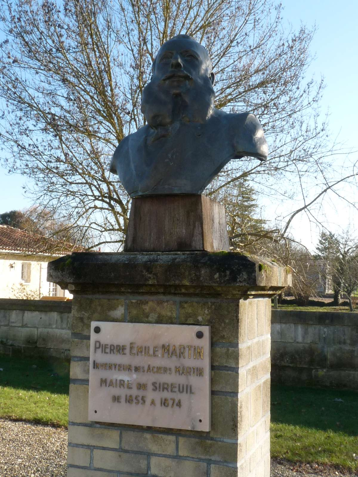 buste de Pierre-Emile Martin, en face de la mairie de Sireuil, Charente, France